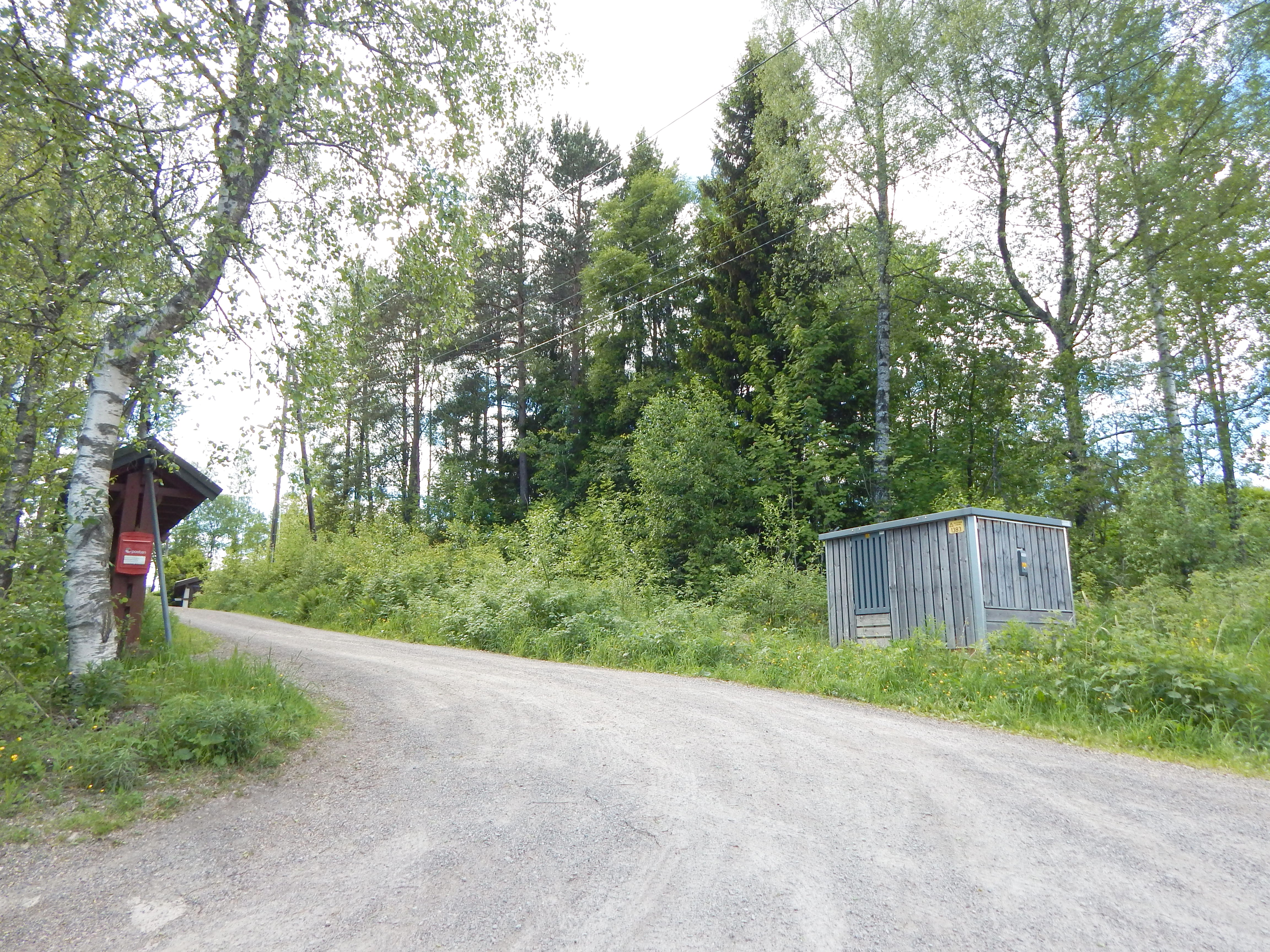 Haugakollveien